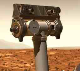 Caméra panoramique et spectromètre Mini-TES des rovers de la mission MER sur Mars.